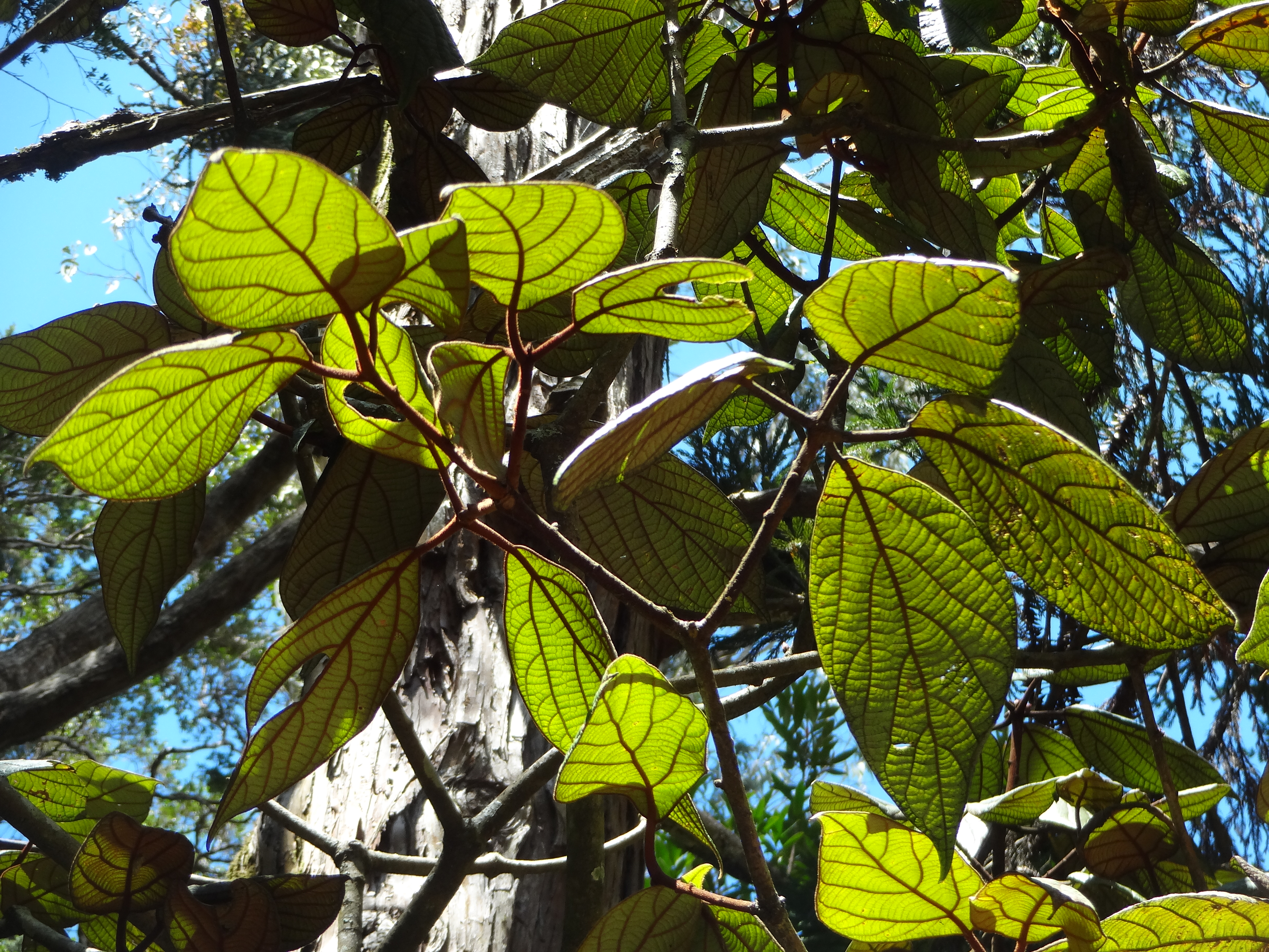 Actinodaphne speciosa in Hakgala Botanical Garden